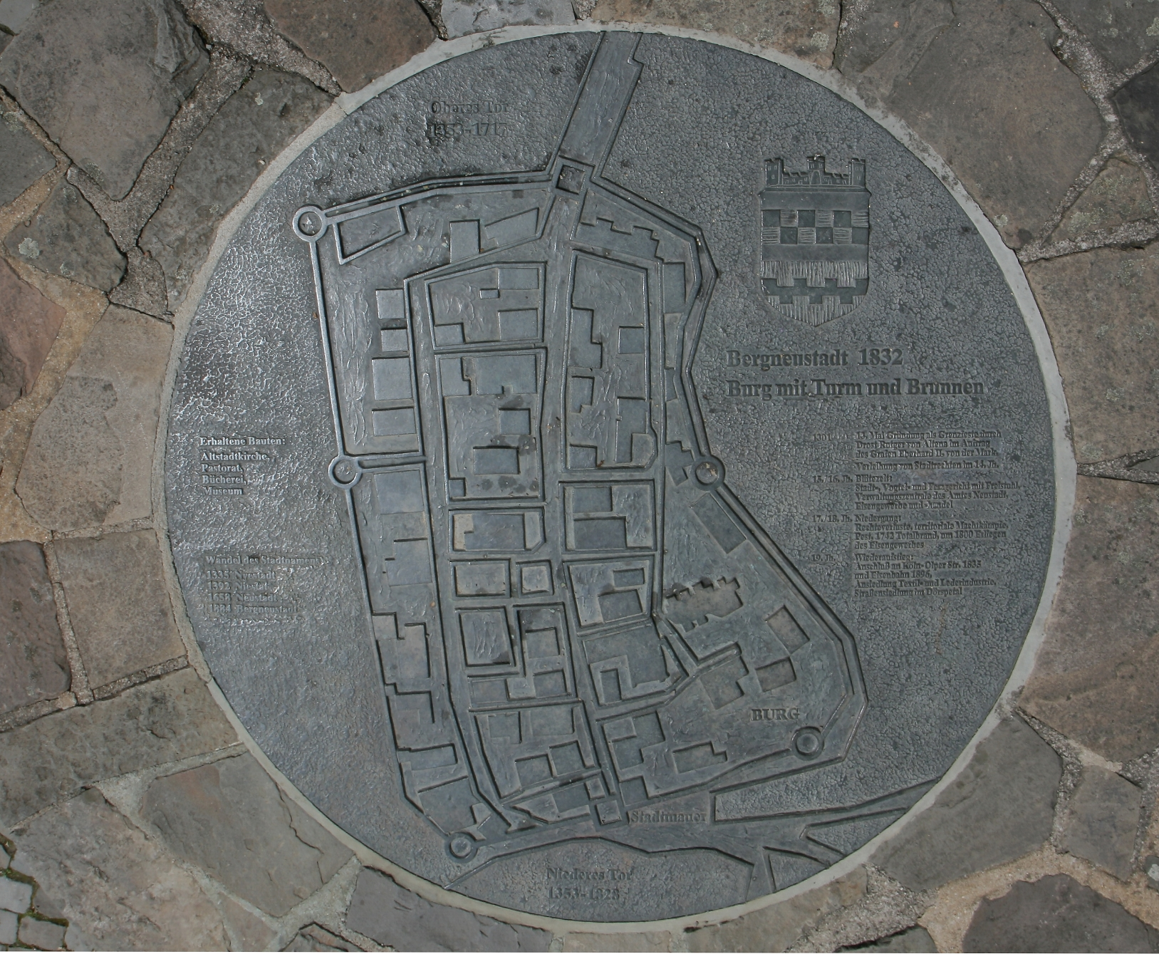 Relief „Bergneustadt 1832 - Burg mit Turm und Brunnen“, Bergneustadt, Kirchplatz.